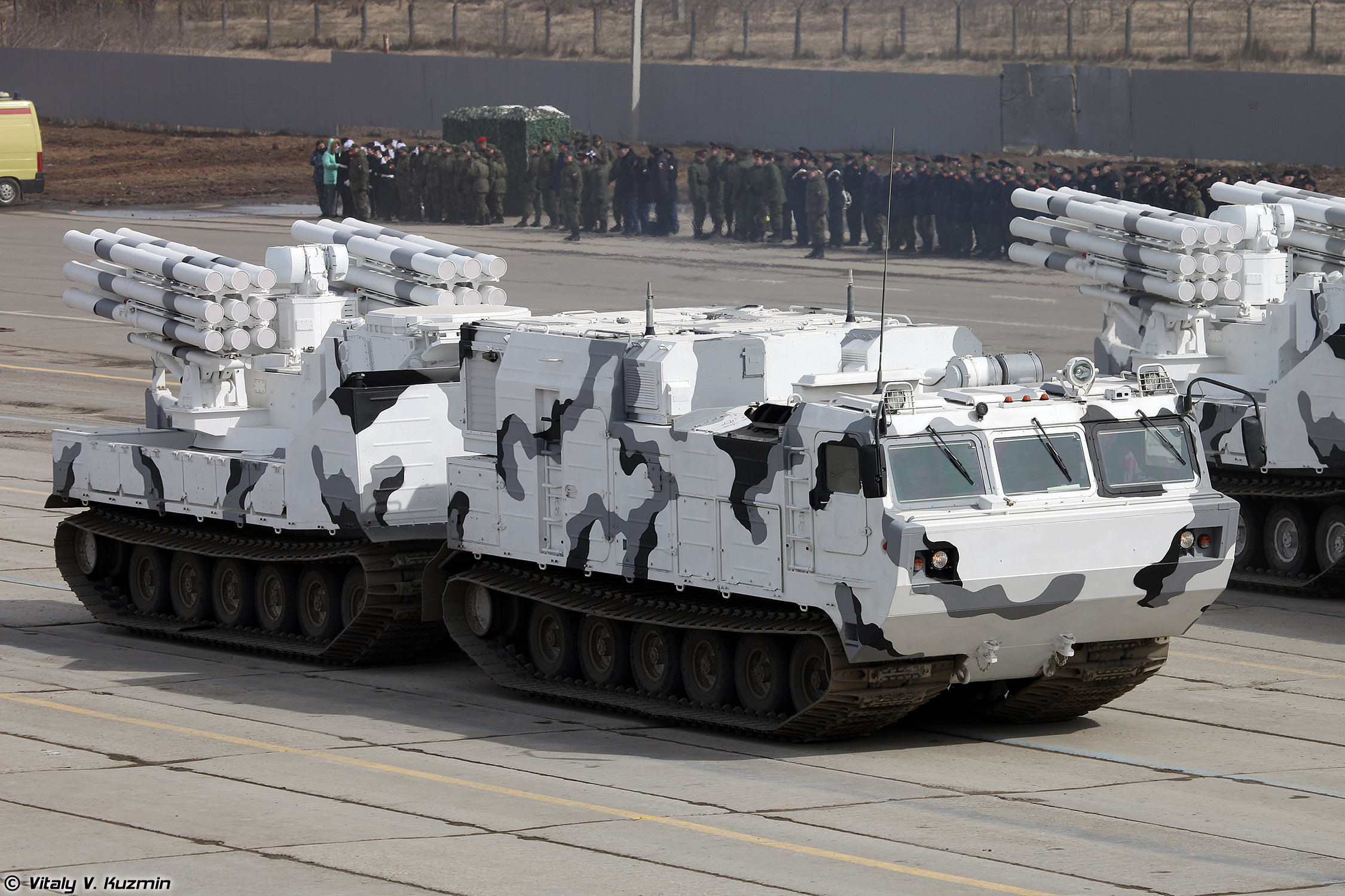 ЗРПК Панцирь-СА на базе двухзвенного гусеничного транспортера ДТ-30ПМ (Pantsir-SA air defence system on DT-30PM transporter chassis)